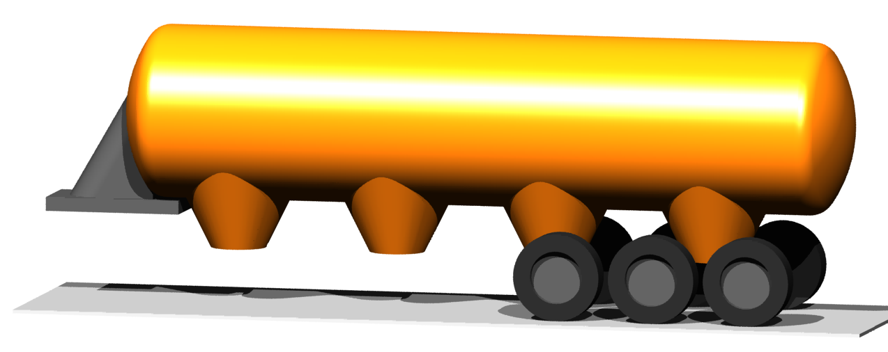 Schematische Darstellung eines Silofahrzeug-Sattelschlepper-Auflieger der Bauform 'Euterfahrzeug'.